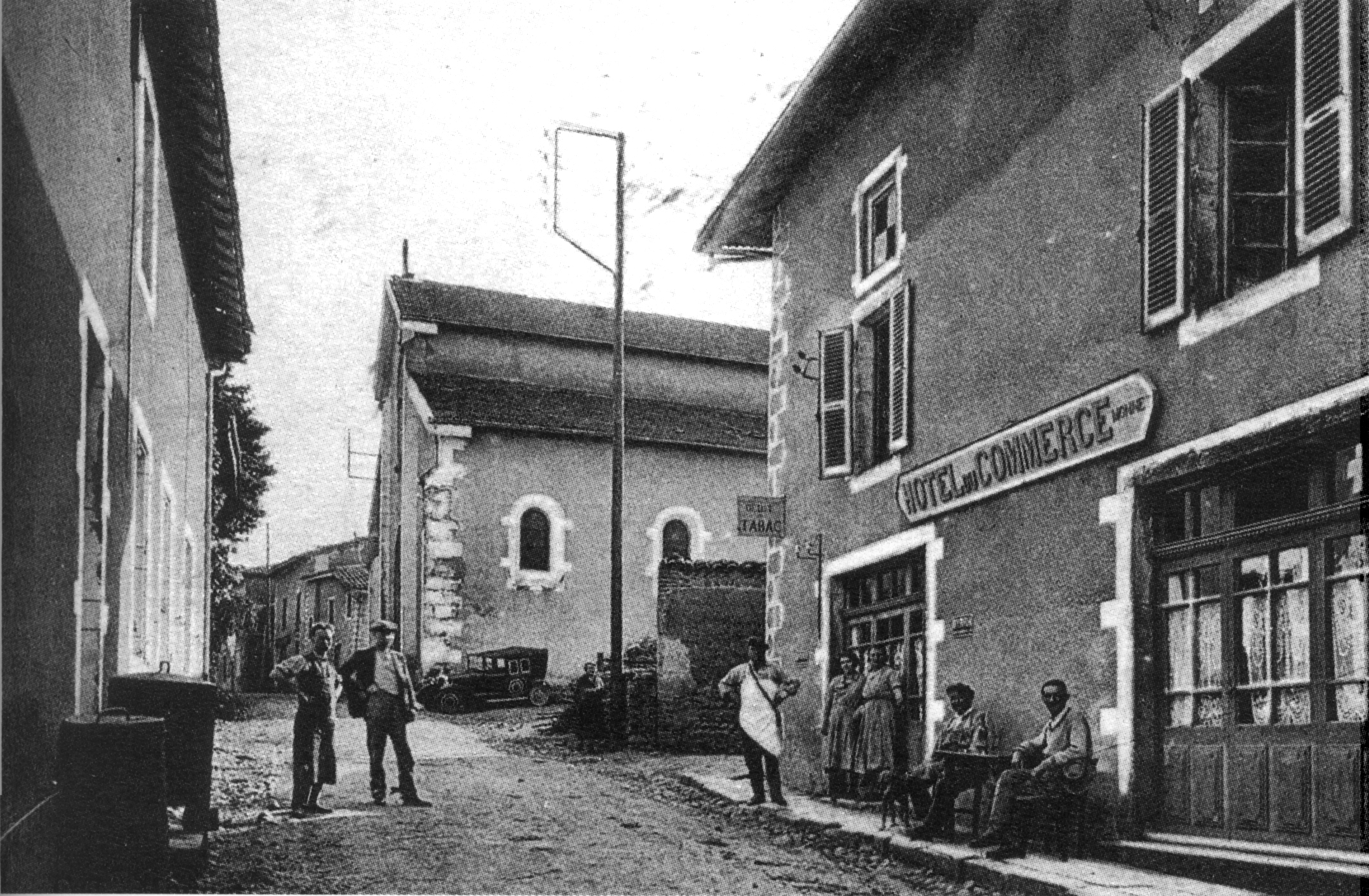 Pommier-de-Beaurepaire, vers 1930